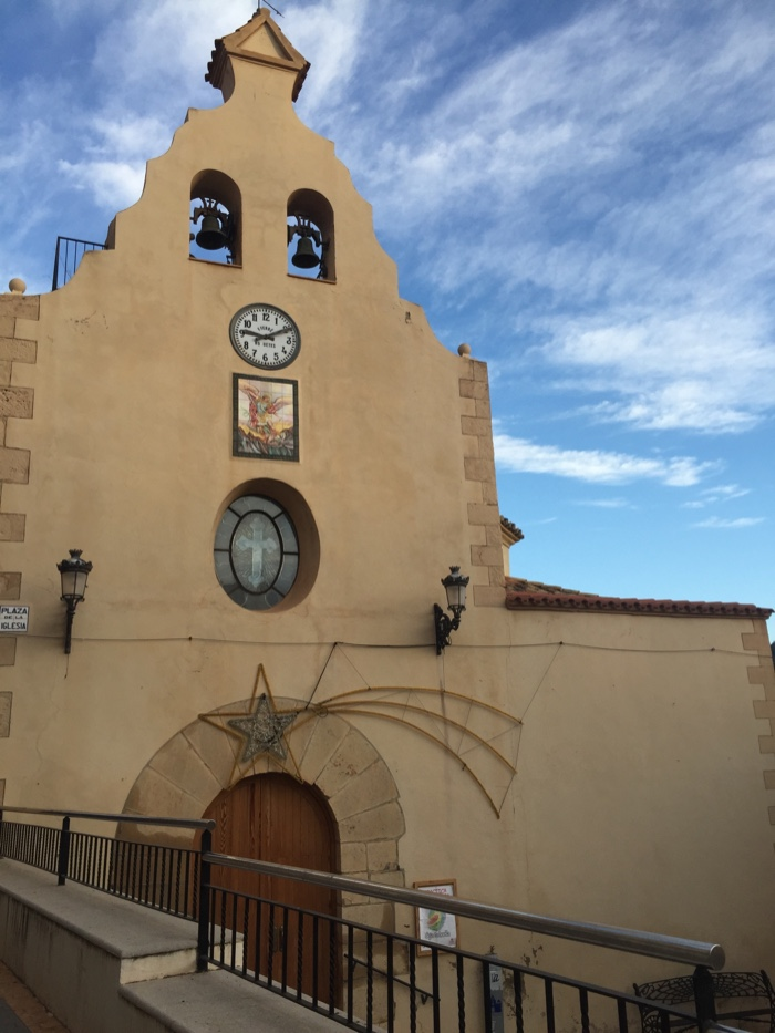 Església de sant Miquel de la Foia